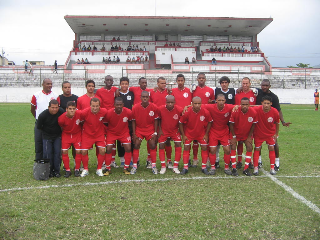 Time do Esporte Clube Nova Cidade, em 2007, na disputa da Terceira Divisão.